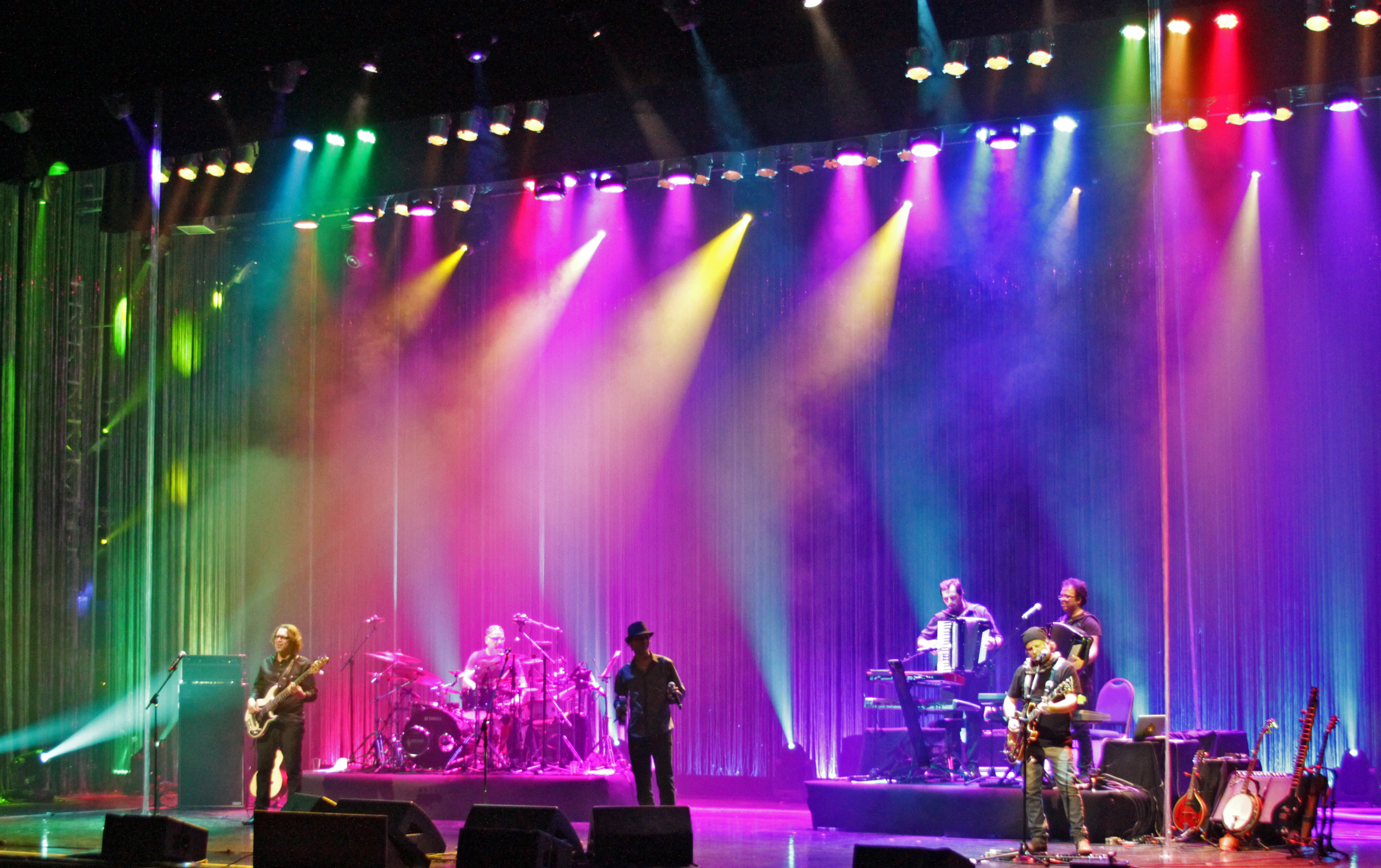 Zeca Baleiro se apresentou no Teatro do Sesi, em Porto Alegre, dia 07 de novembro de 2013, com o projeto Zeca baleiro canta Zé Ramalho. (Foto: Rafaela Ely)